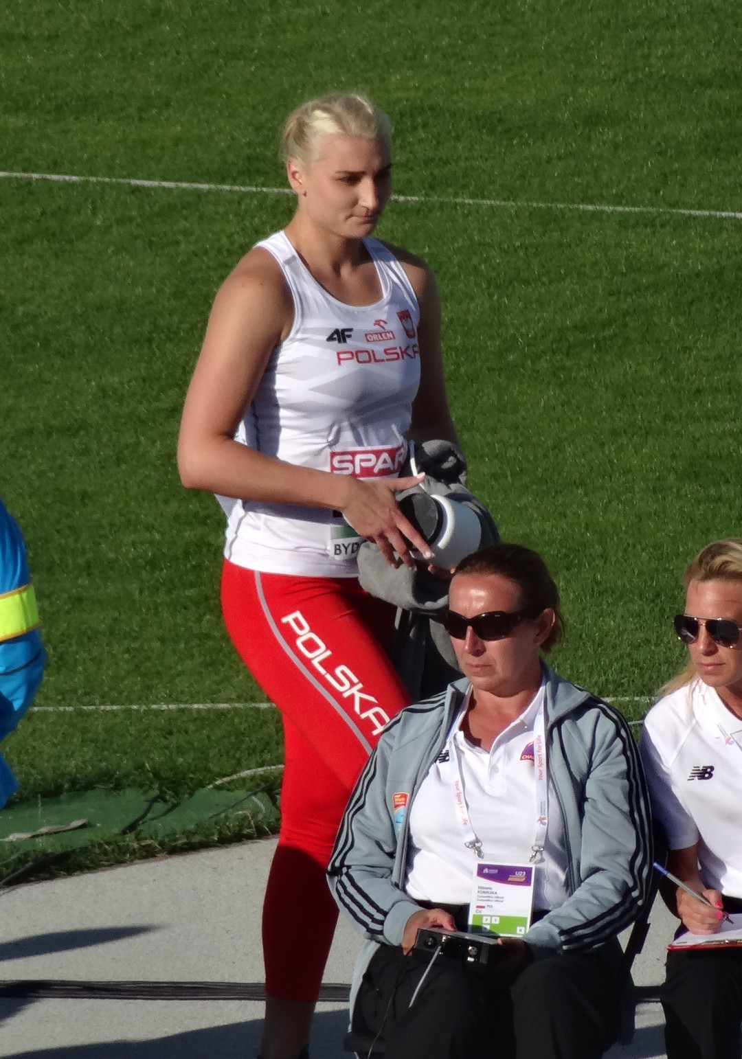 Młodzieżowe Mistrzostwa Europy w Lekkoatletyce U23 w Bydgoszczy 13-16 lipca 2017, kwalifikacje rzutu dyskiem kobiet